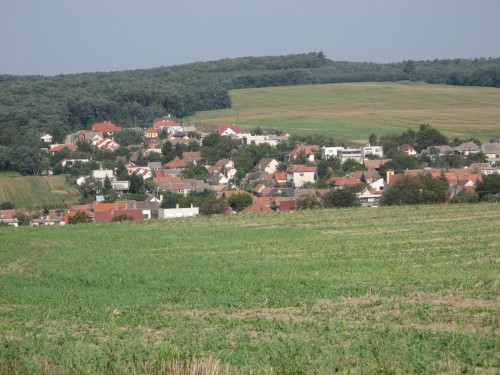 pohľad na dedinku Smolinské